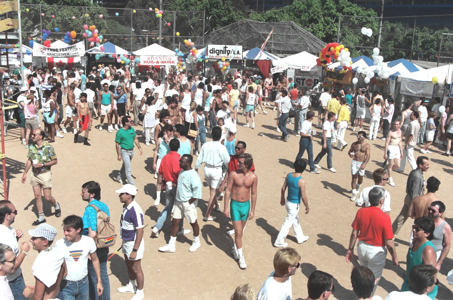 Los Angeles, June 1987